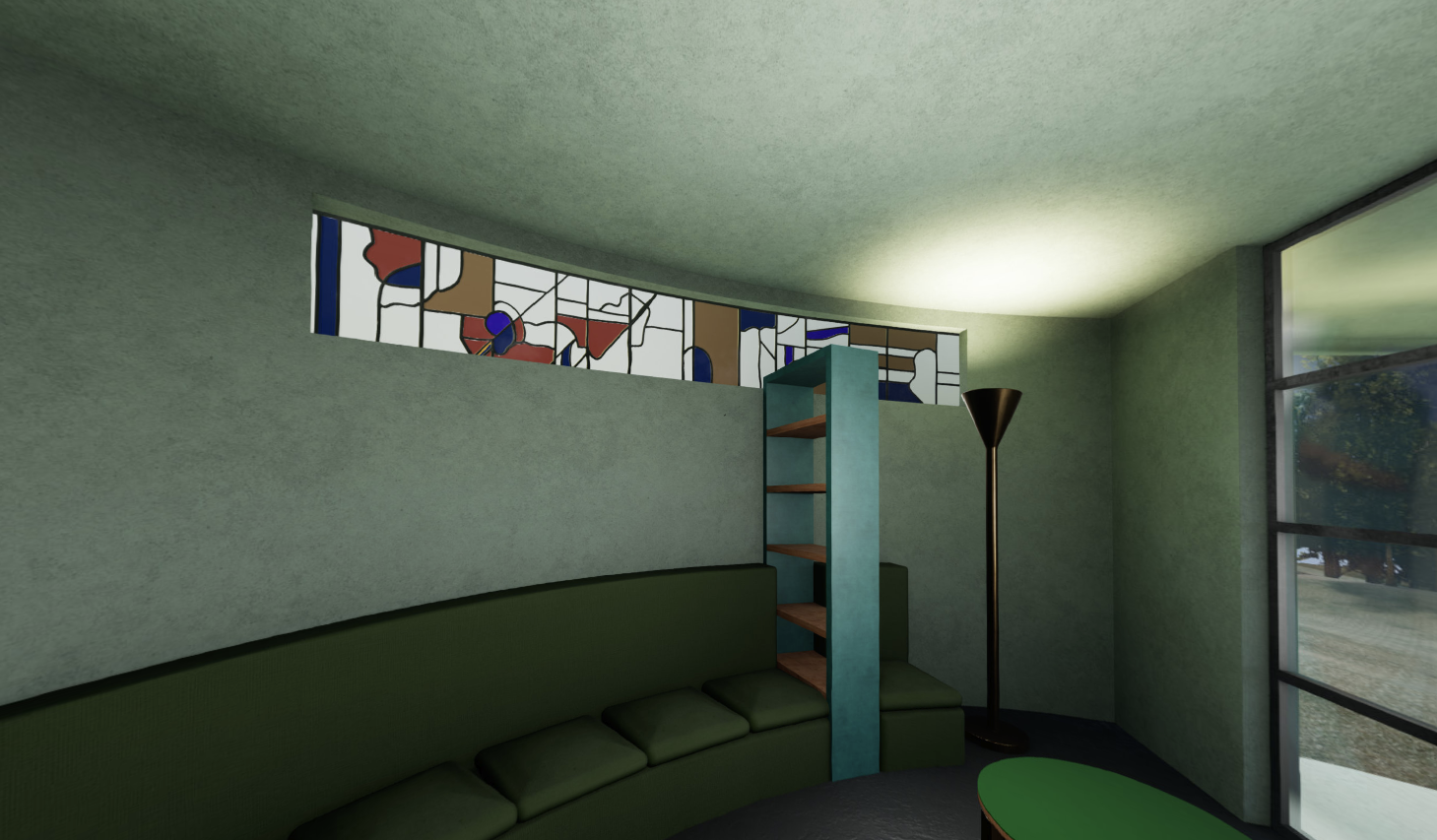 Una ricostruzione virtuale dell'interno della Casa del Sabato per gli Sposi di BBPR e Piero Portaluppi, C